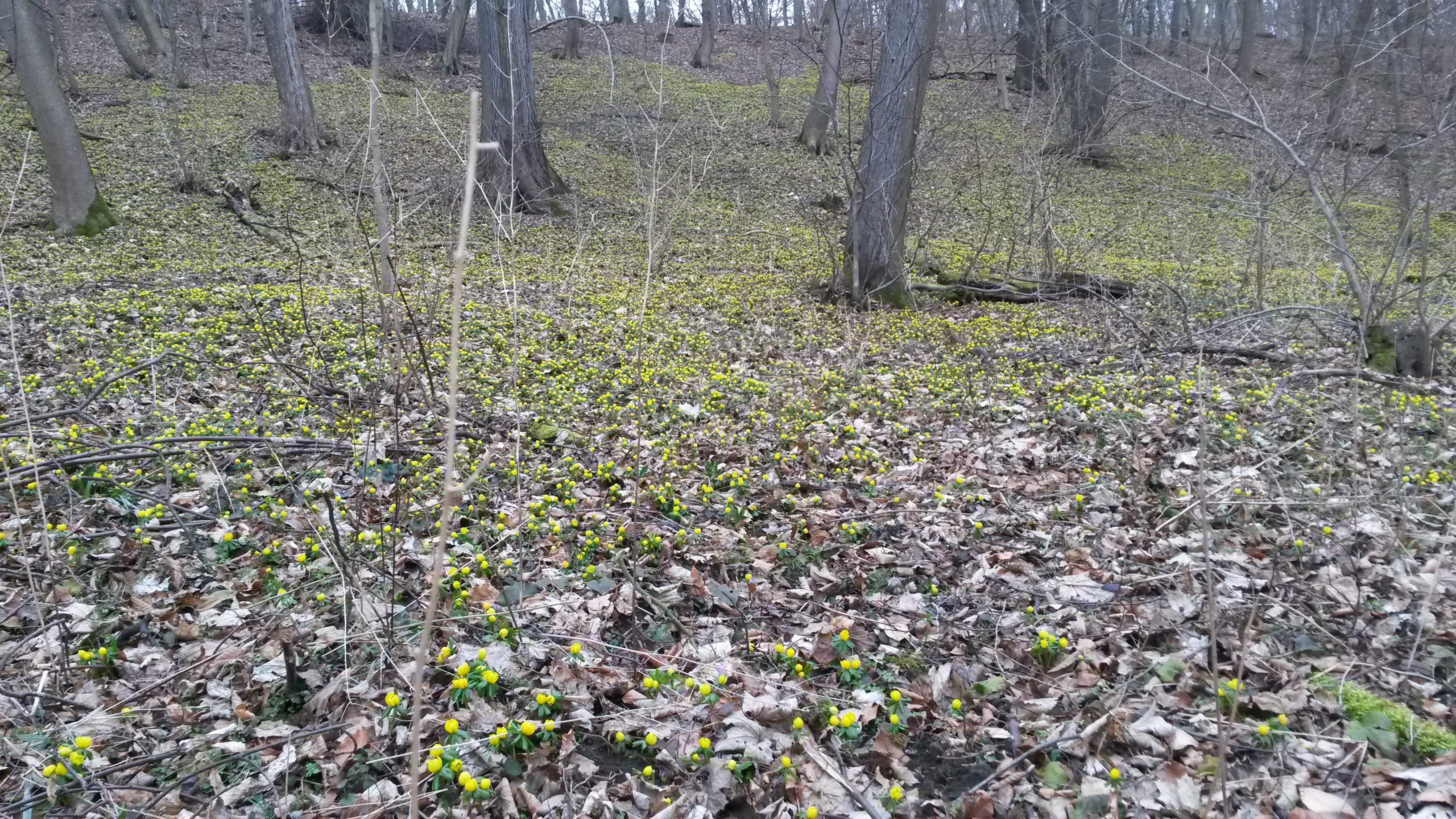 Ausgedehnter Bestand an Winterlingen (Eranthis hyemalis) im Rautal bei Jena (Anfang März)